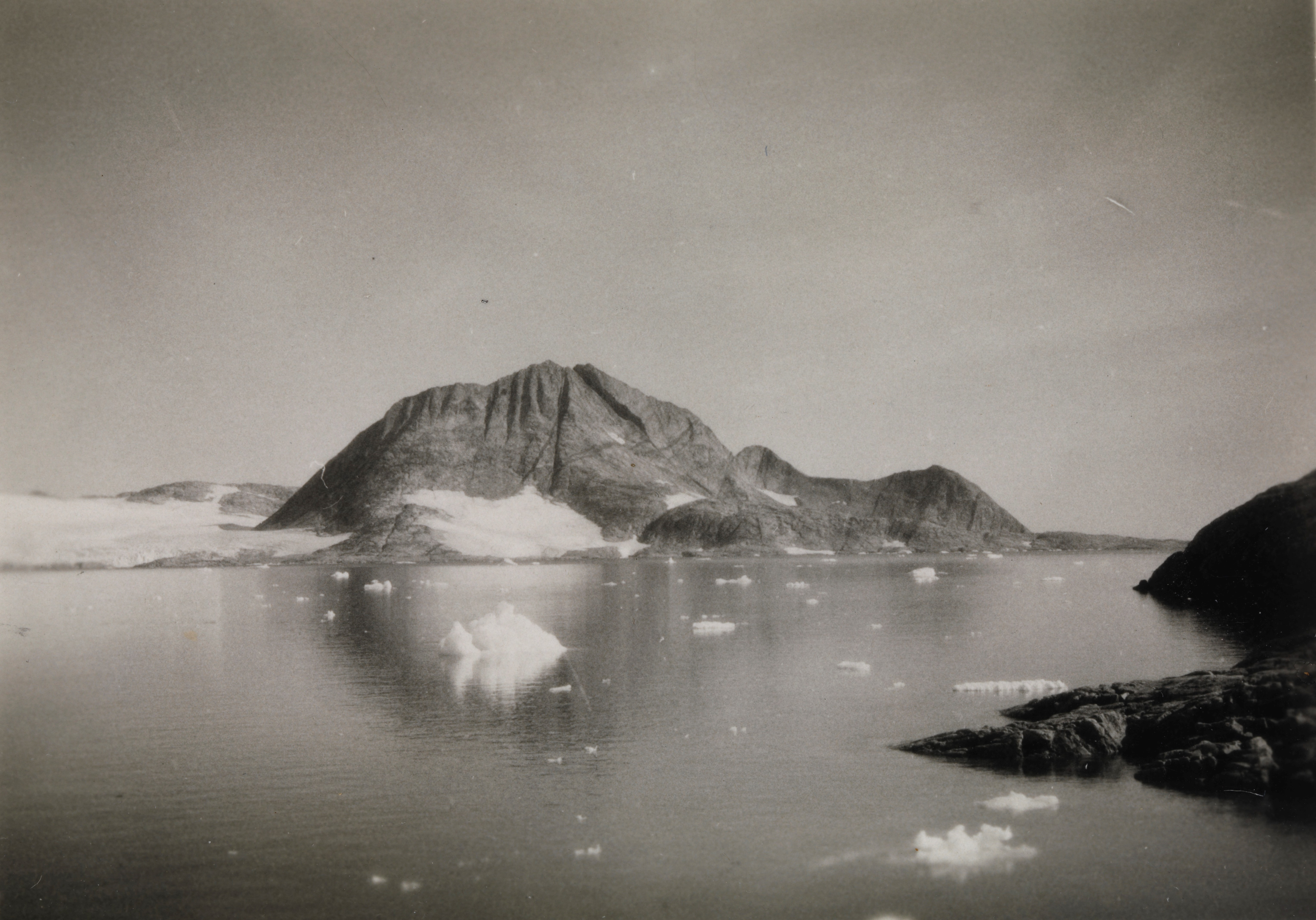 Utsikt østover i Umvik fra stedet hvor Fridtjof Nansens Grønlandsekspedisjon hadde sin siste teltplass, 11. august 1888, på østkysten. I bakgrunnen fjellet Kiatak. Depicted place: Grønland, Umivik